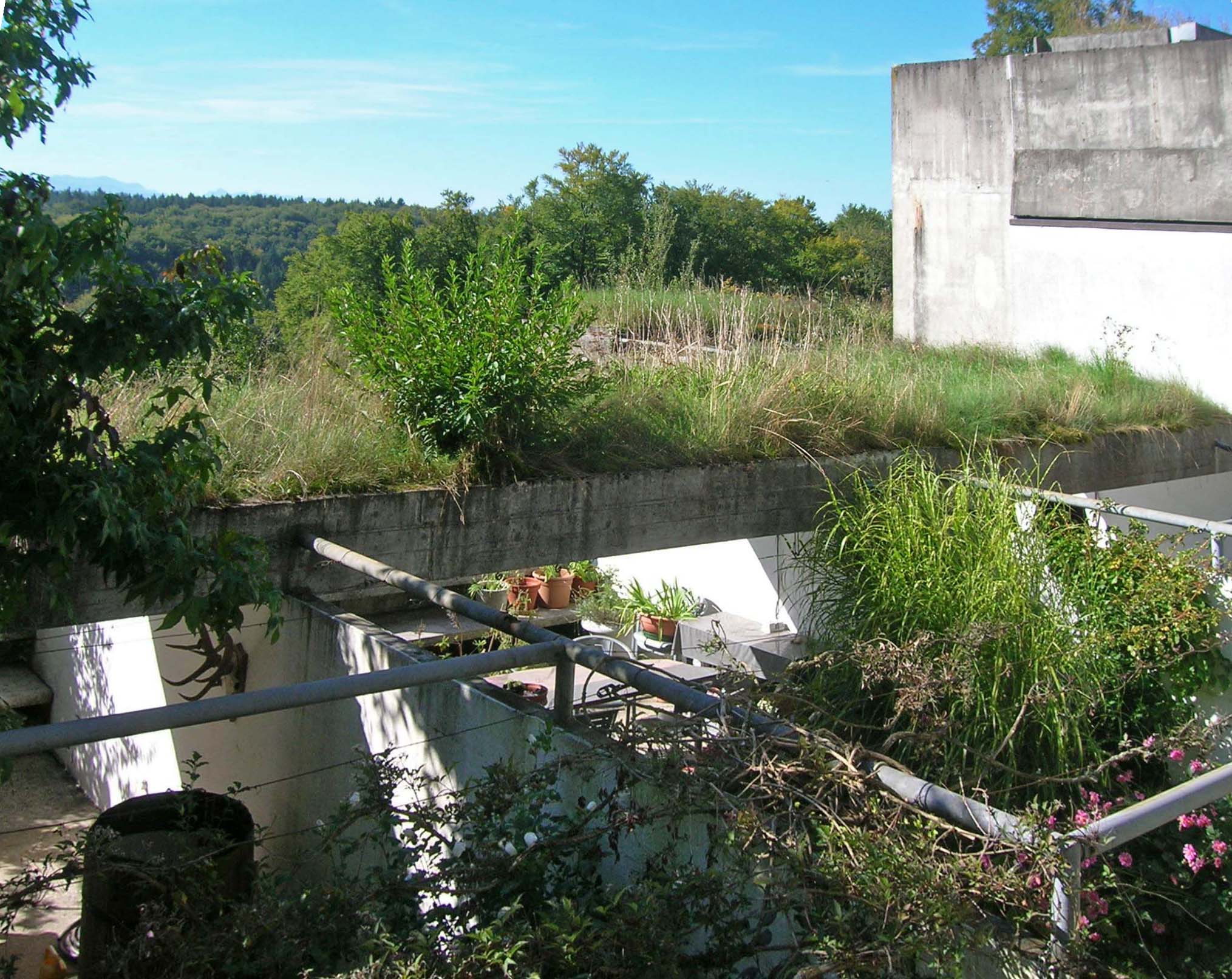 Halensiedlung, Dach- und Gartenansicht